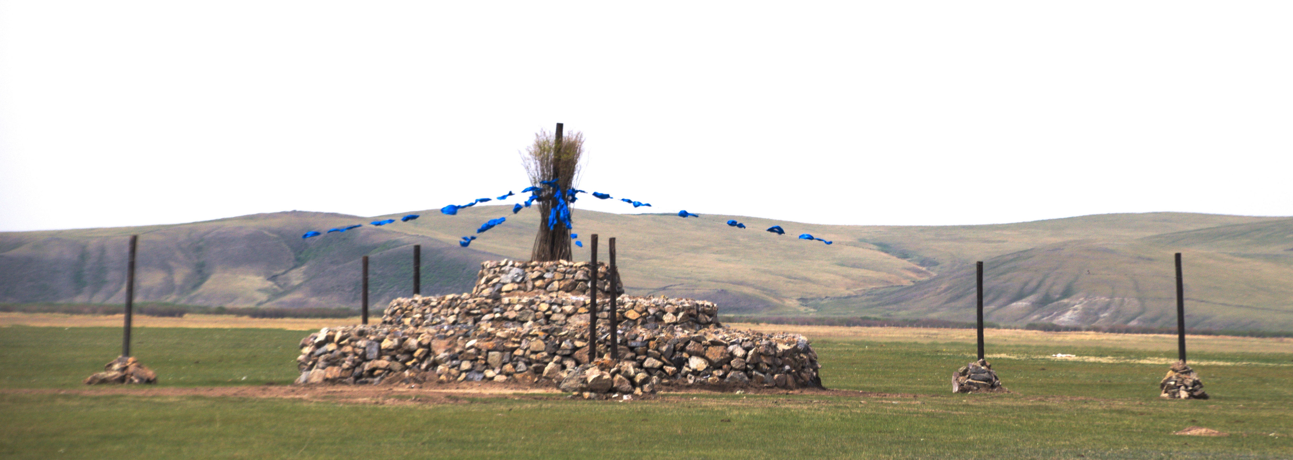 Un ovoo entourré de 8 pillies aux 4 points cardinaux à Hulunbuir, Mongolie-Intérieure, République populaire de Chine.